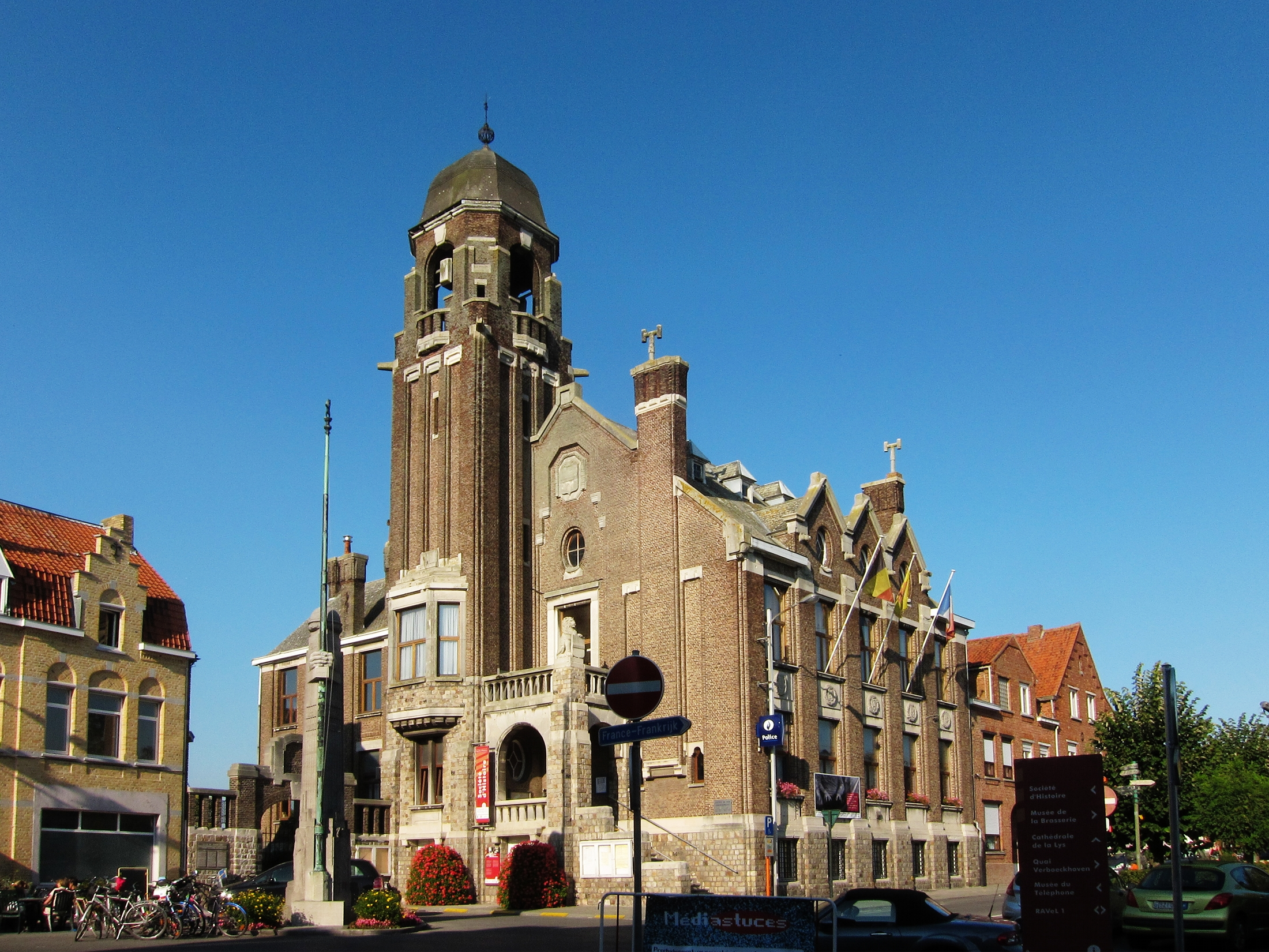 L'hôtel de ville de Warneton (Belgique).